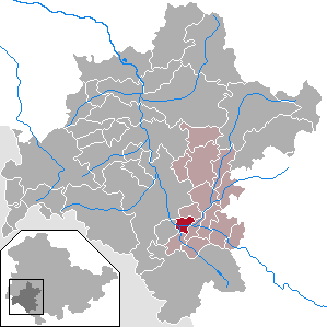 Obermaßfeld-Grimmenthal in Thuringia - District Schmalkalden-Meiningen